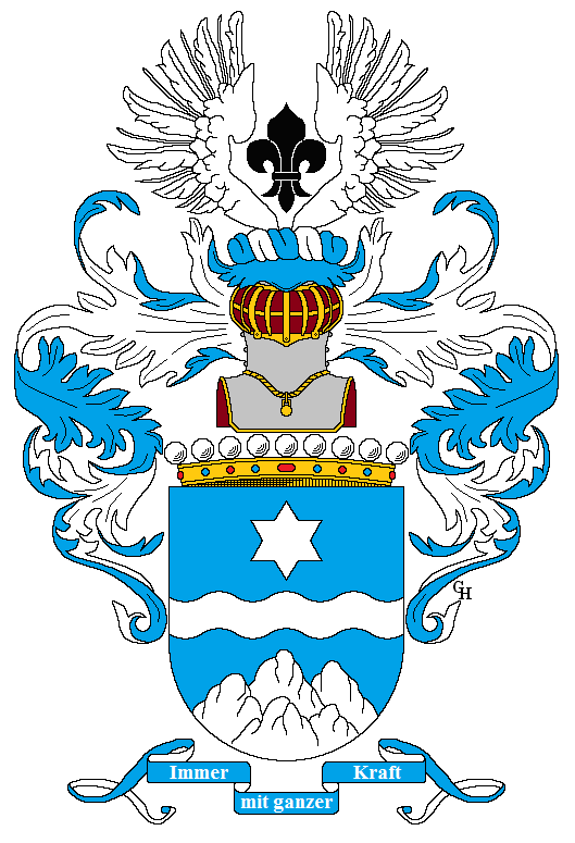 Wappen des k.u.k. Generalobersten Viktor Freiherrn von Dankl (1854–1941), verliehen anlässlich seiner Erhebung in den österreichischen Grafenstand mit dem Prädikat "von Krasnik" 1918. Zeichnung von Gerd Hruška ( Für weitere Informationen zu dieser Standeserhebung siehe (